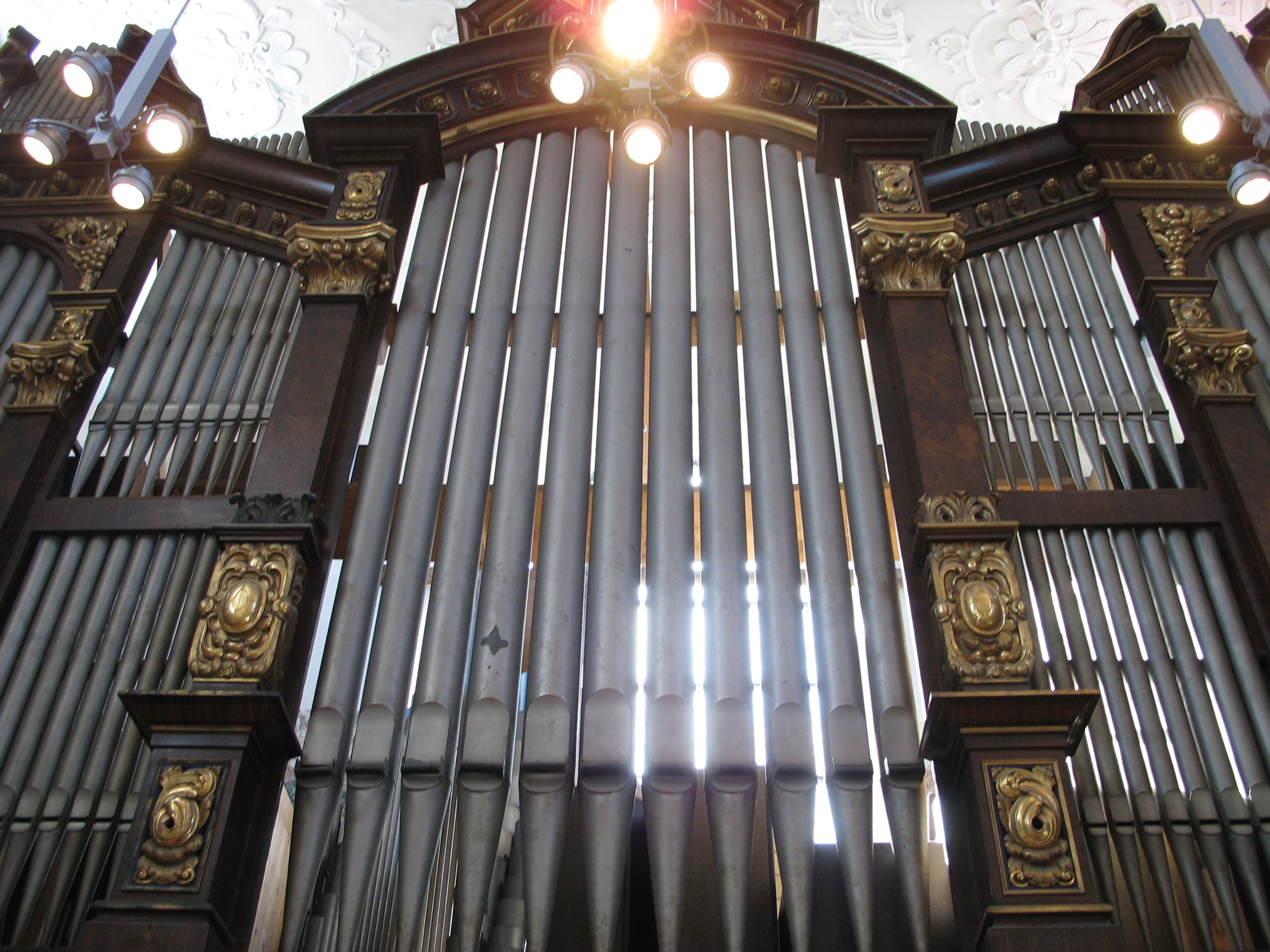 Konstanz, Dreifaltigkeitskirche, Orgelprospekt